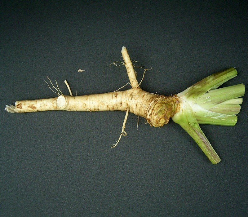 Armoracia rusticana